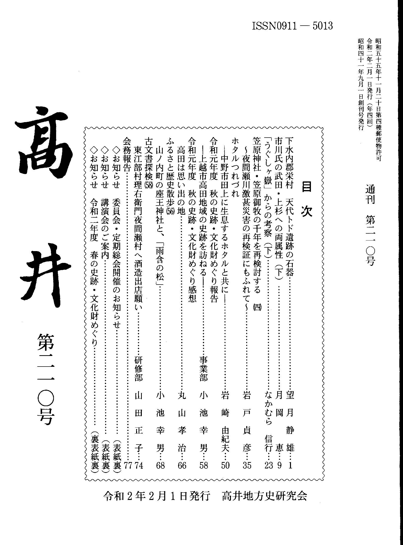 高井第210号目次 ページ （高井地方史研究会発行）